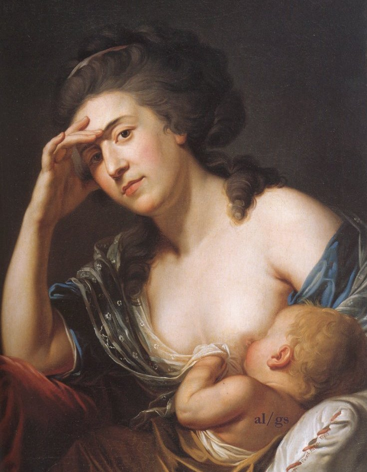 Johann Baptist Lampi der Ältere (1751–1830): Die Frau des Malers, Anna Maria Franchi (1745–1795), mit ihrem Sohn Franz Xaver (1782–1852), Klagenfurt 1783 (Ferdinandeum Innsbruck).